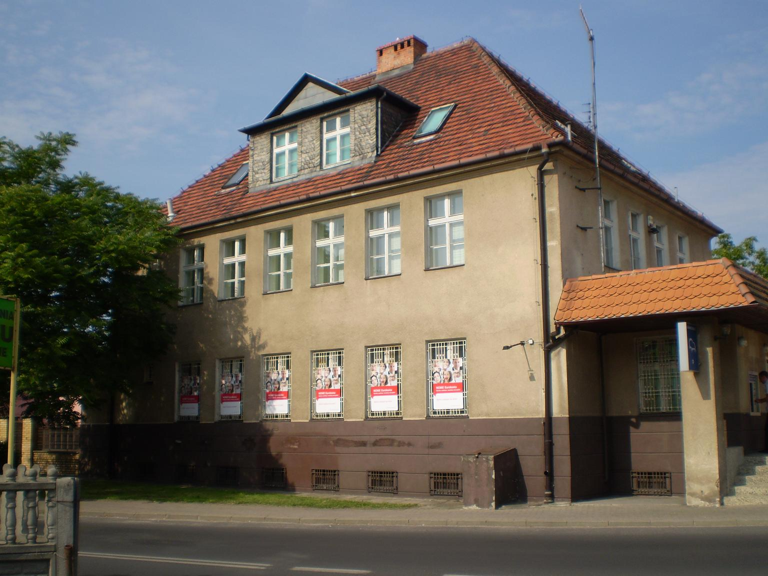 Gubin, ul. Nowa 2 - dawna przychodnia, obecnie bank Pekao